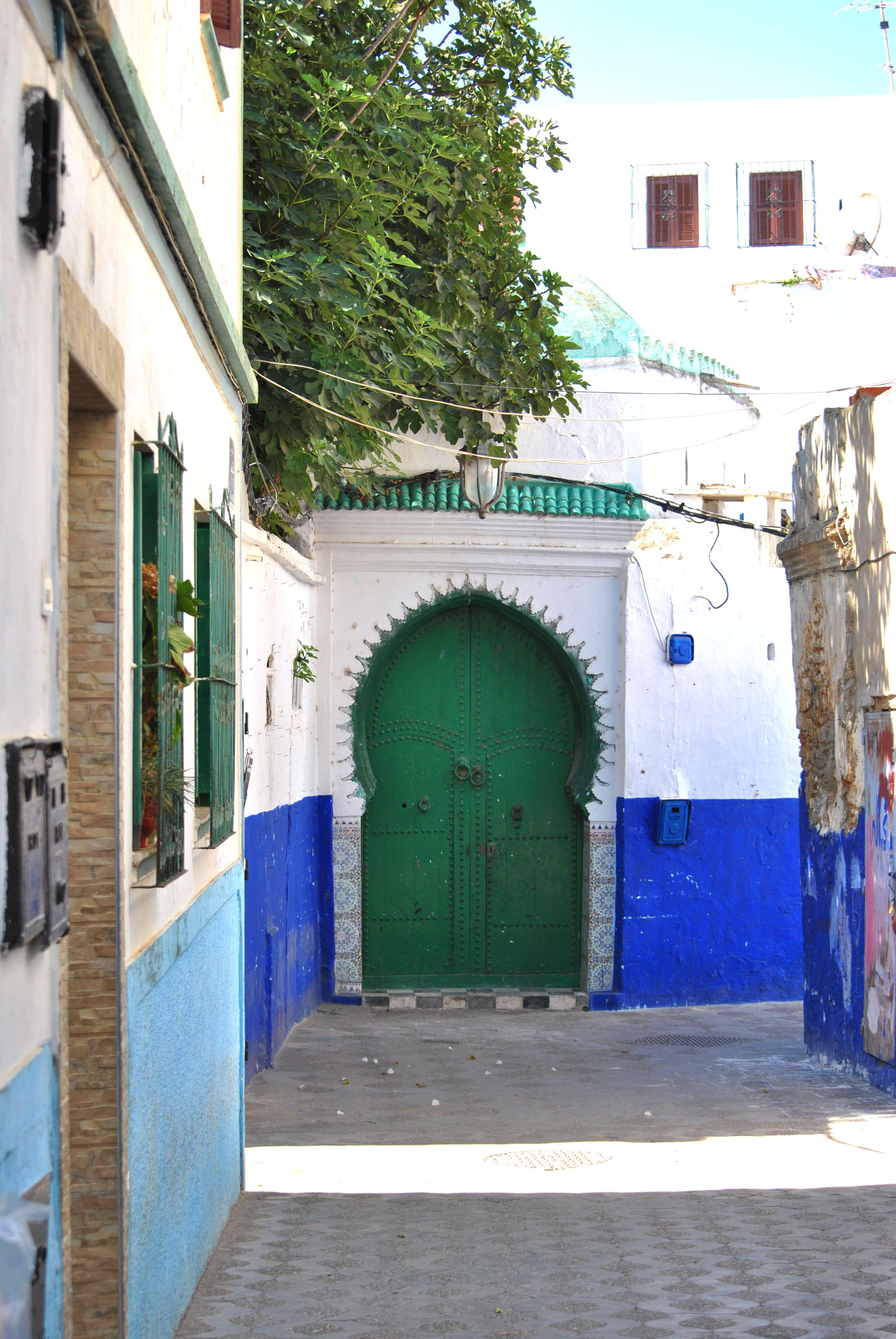 Porte à Assilah